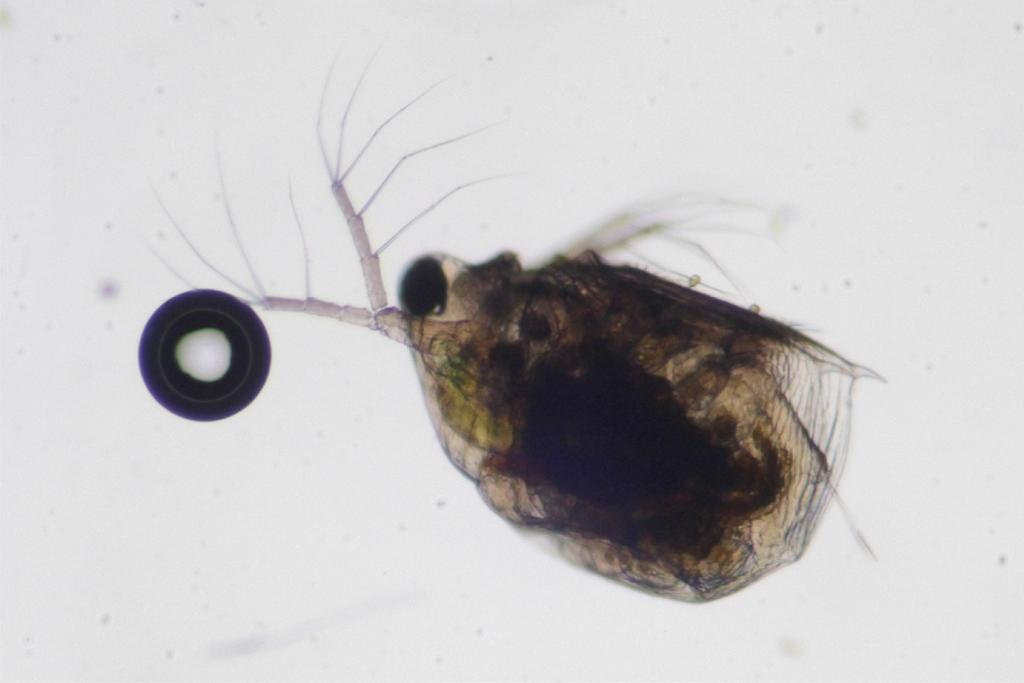 Scapholeberis sp.：アオムキミジンコ属の1種 Col. 2017/05/26 和歌山県田辺市：Tanabe City. Wakayama Pref. Japan